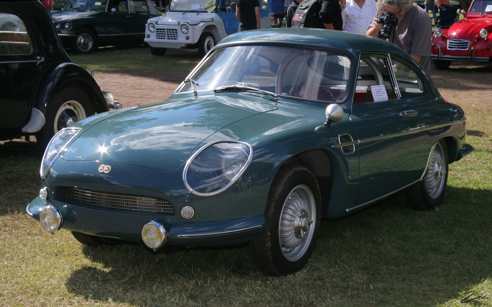 1959 Deutsch Bonnet HBR5 - fvl2